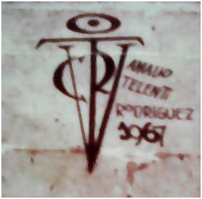 Victor